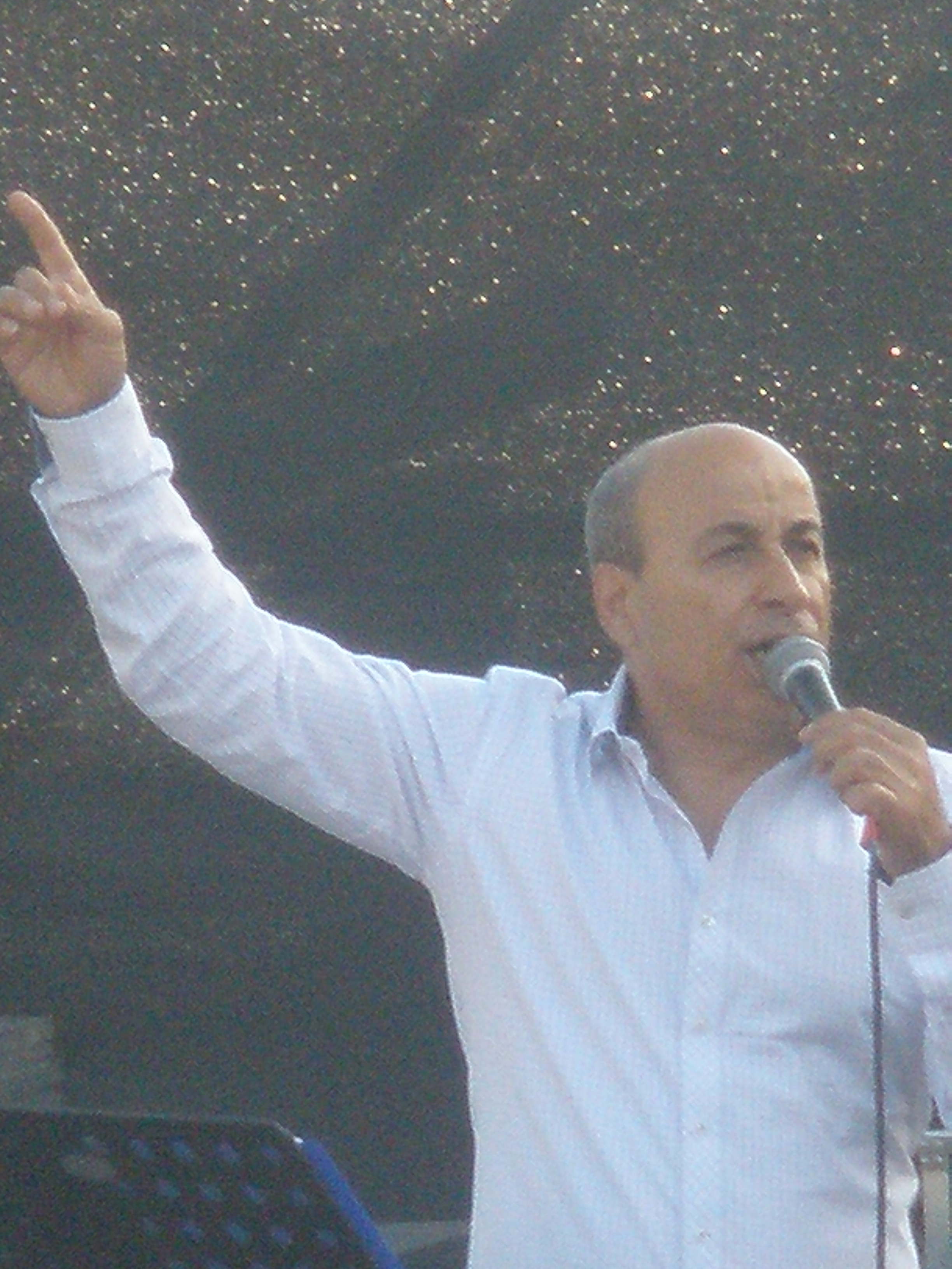 איציק קלה בהופעה בחולון